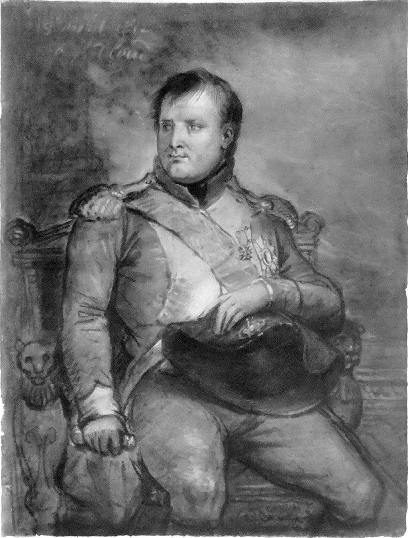 Anne-Louis Girodet, Napoléon au théâtre à Saint-Cloud le 13 avril 1812 dessin au fusain 1812. Musée Bertrand Chateauroux (ancienne collection du comte A. d'Hunolstein)